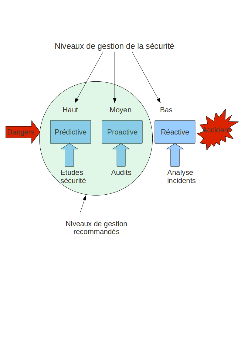 schéma des 3 niveaux de gestion de la sécurité